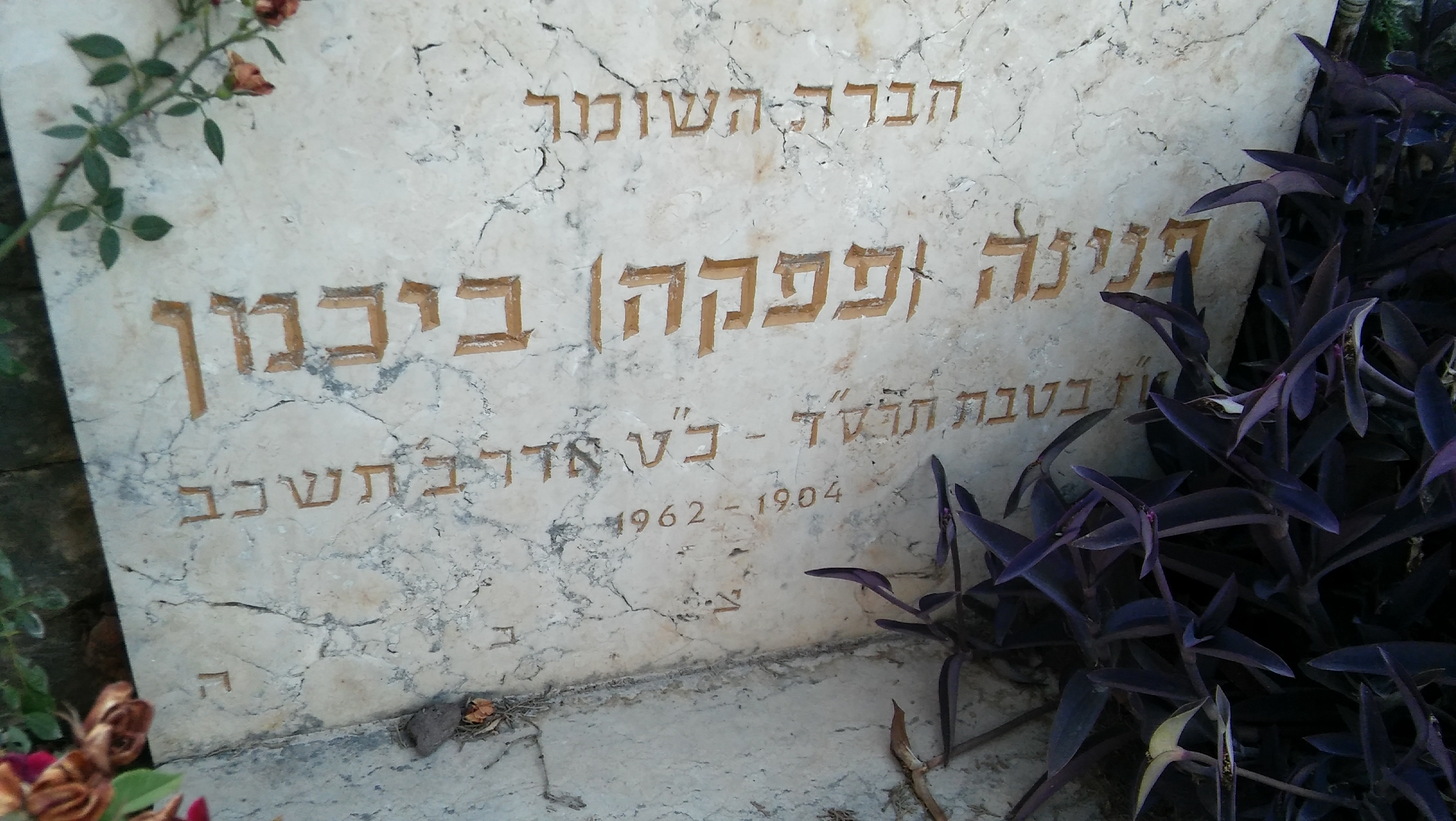 קברה של פנינה בוכמן בחלקת השומר בבית הקברות בכפר גלעדי